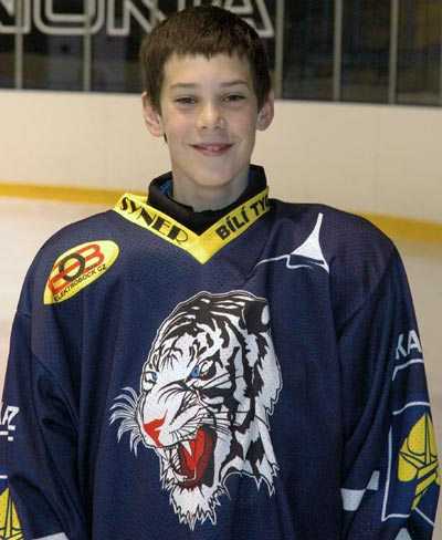 Dvořák za Tygry